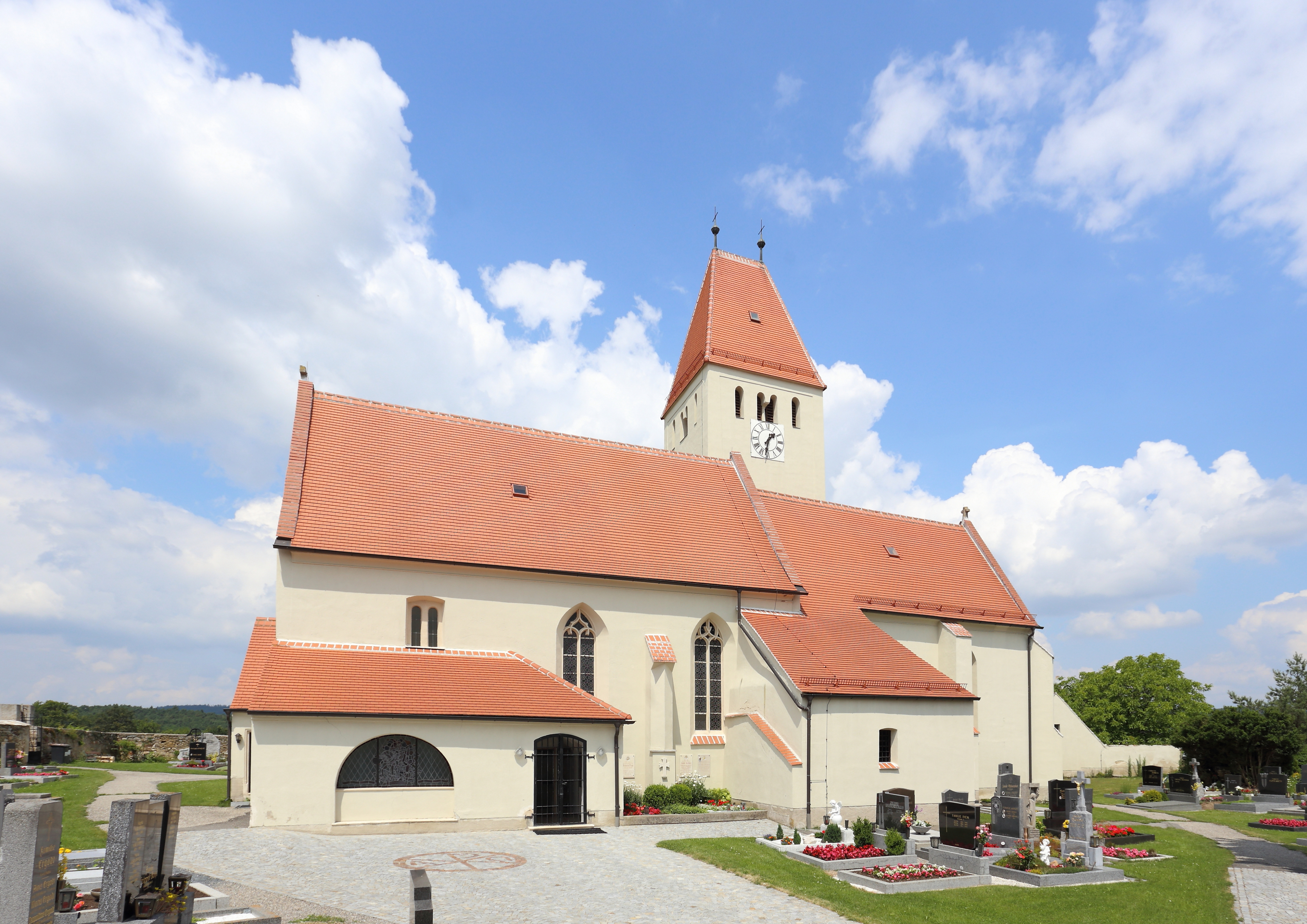 Südansicht der katholischen Pfarrkirche hl. Martin in Neukirchen an der Wild, ein Ortsteil der niederösterreichischen Gemeinde Brunn an der Wild.